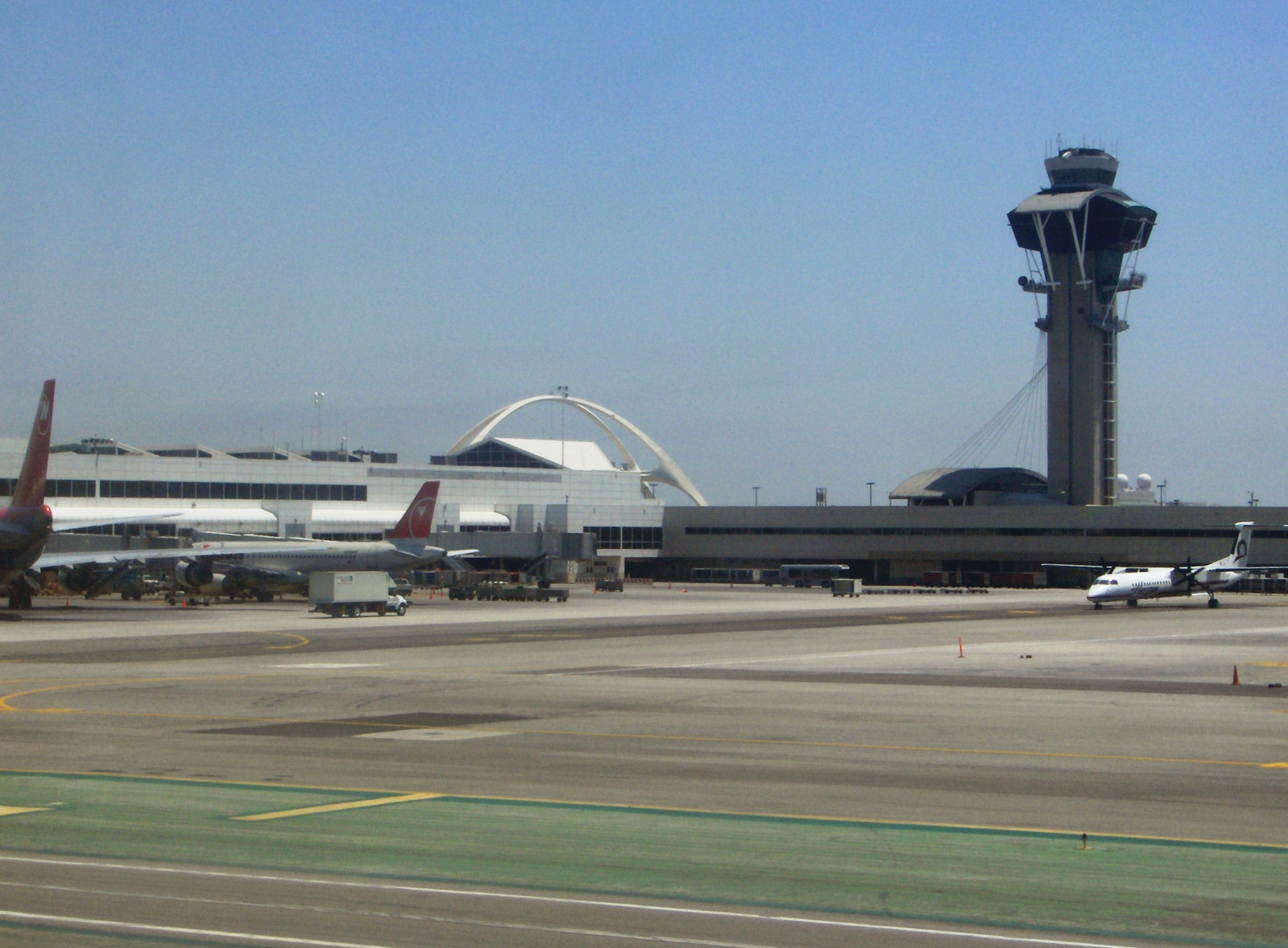 Een foto 2 kenmerkende gebouwen van LAX, het restaurant met 'bogen' en de luchtverkeersleidingstoren.